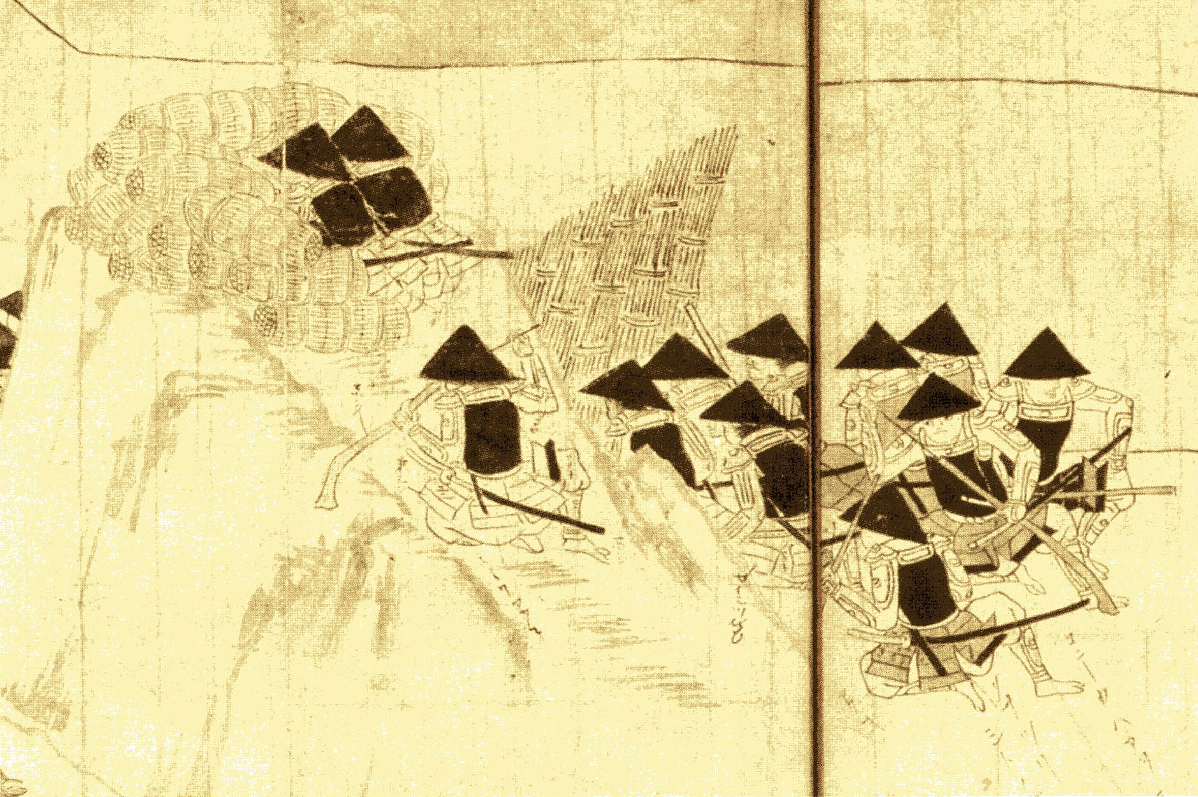 大坂冬の陣図屏風（一部）